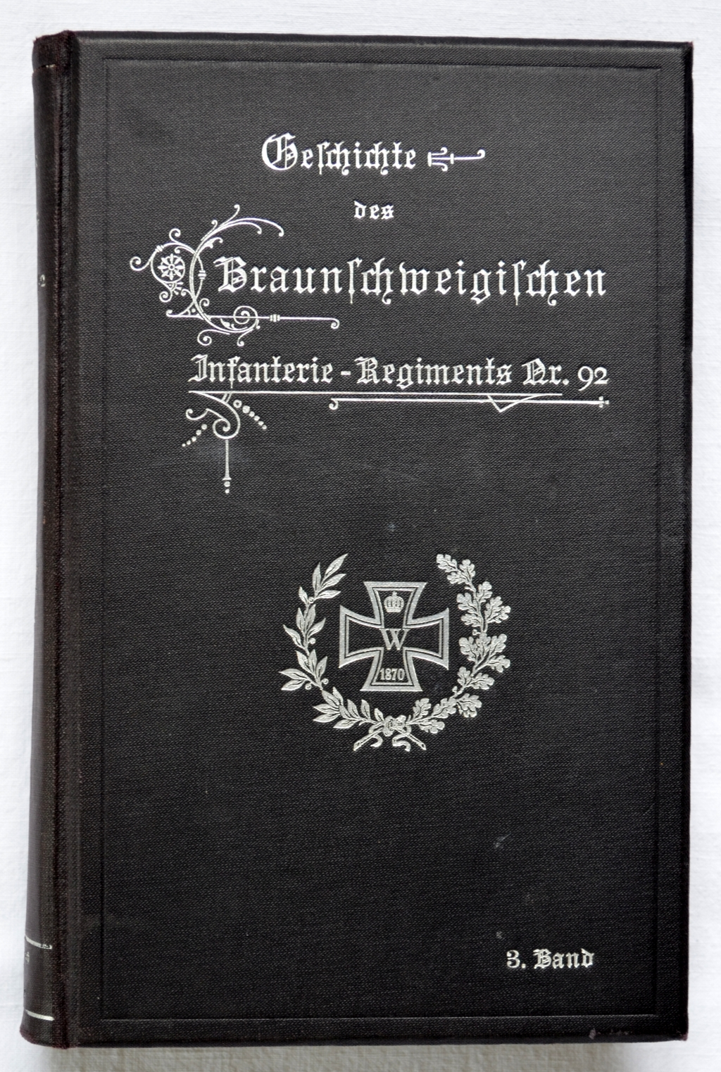 Einband des 3. Bandes von: Gustav von Kortzfleisch: Geschichte des Herzoglich Braunschweigischen Infanterie-Regiments Nr. 92 und seiner Stammtruppen 1809–1902., 3 Bände, Druck und Verlag Albert Limbach, Braunschweig 1896–1903.